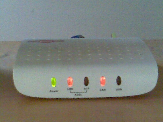 ADSL modem slikan mobilnim telefonom.